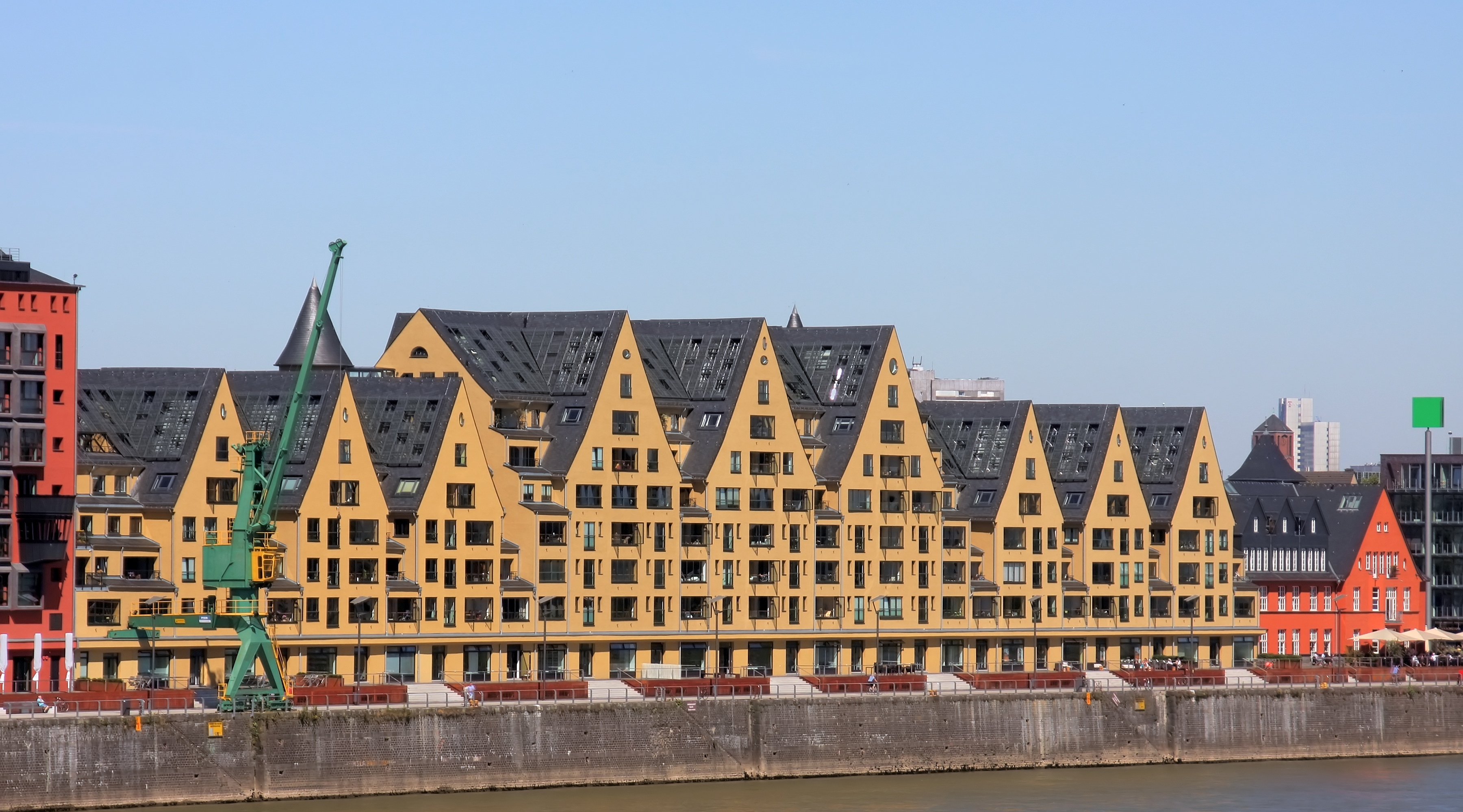 Rheinauhafen Köln. Rheinseite. Häuser von links nach rechts: Silo 23 (angeschnitten), Siebengebirge, Rheinkontor.